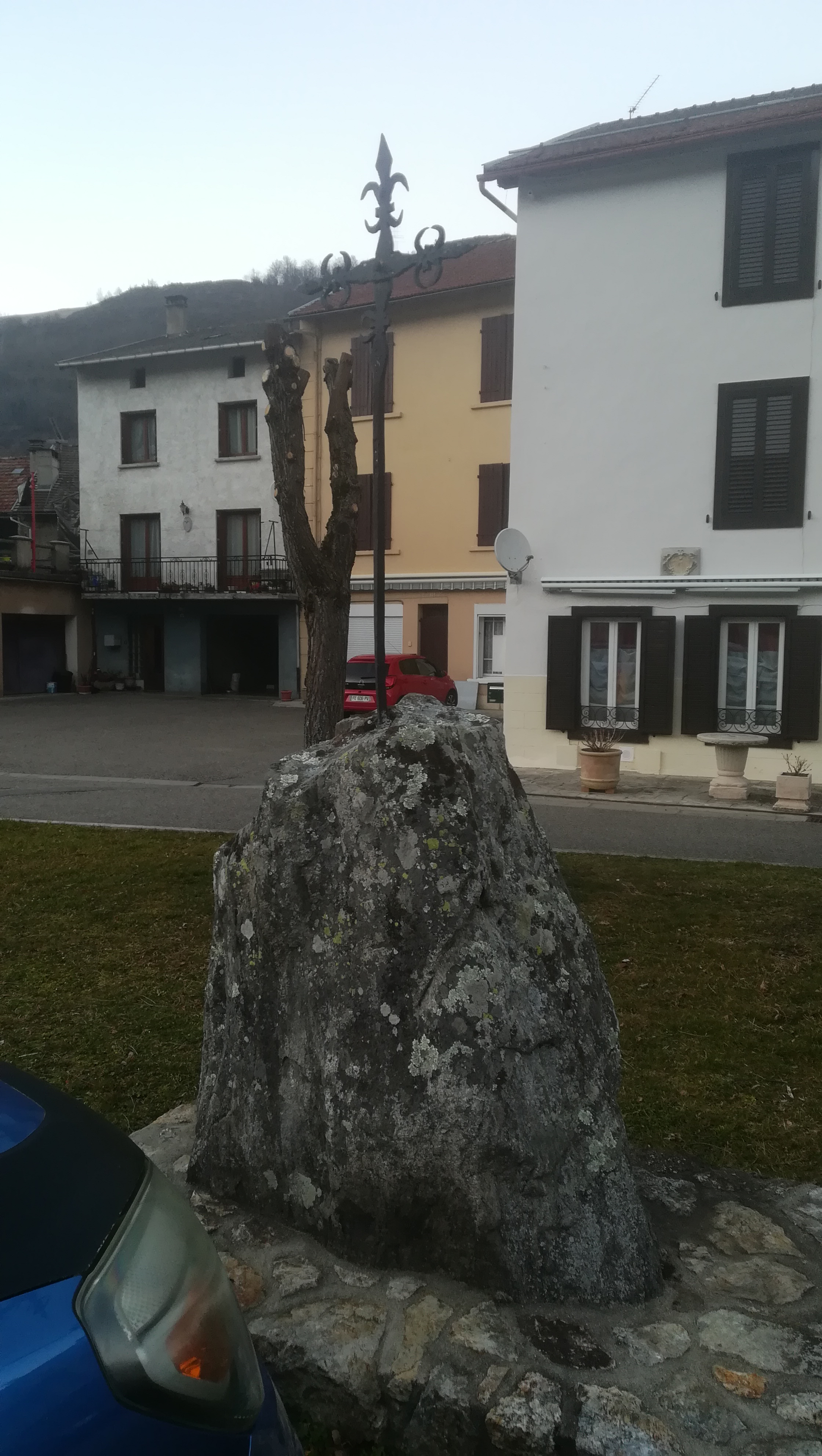 Menhir de Savignac-les-Ormeaux, surmonté d'une croix